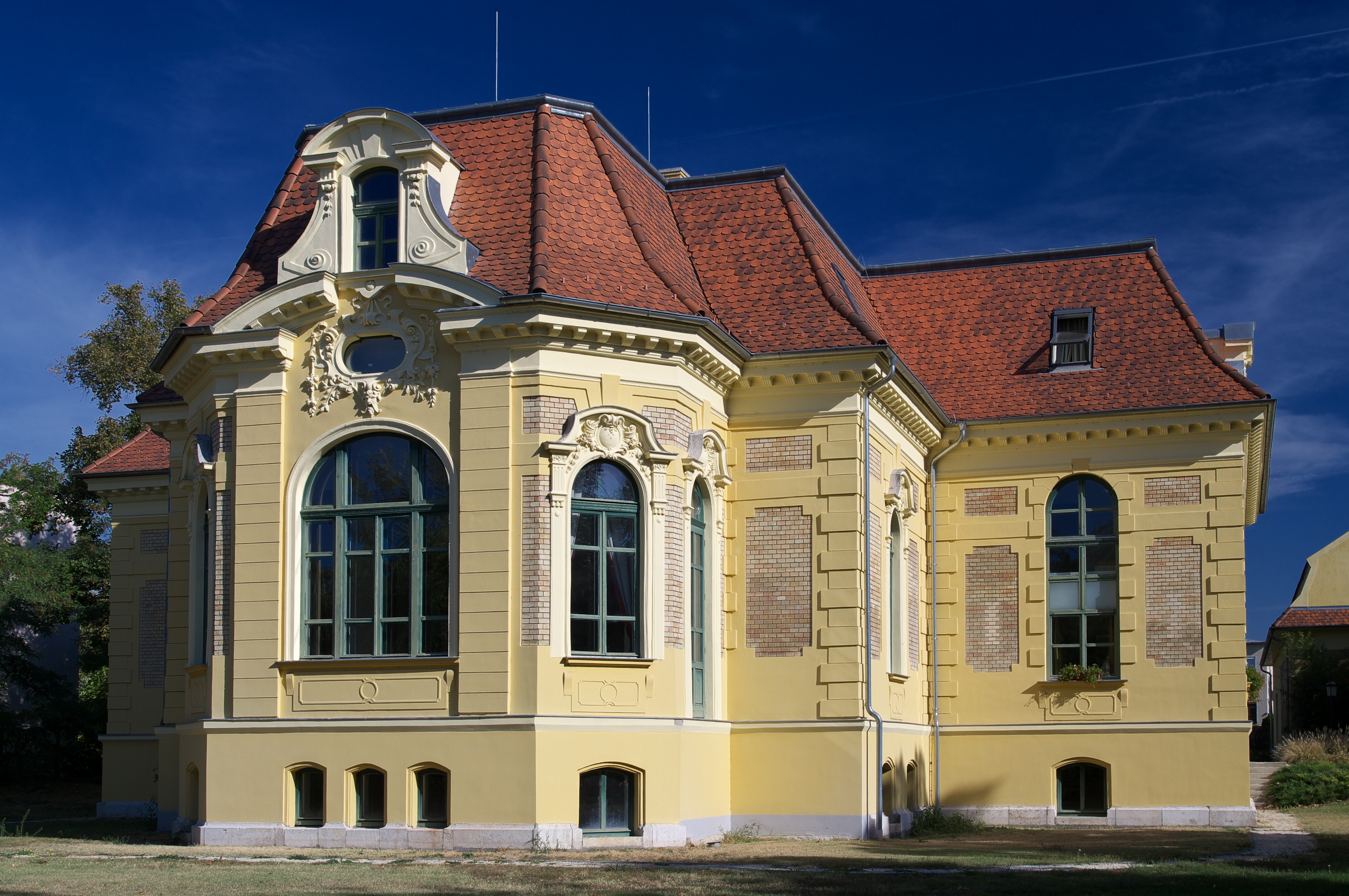 Malonyai-kastély (Halásztelek, Rákóczi Ferenc utca 60.)